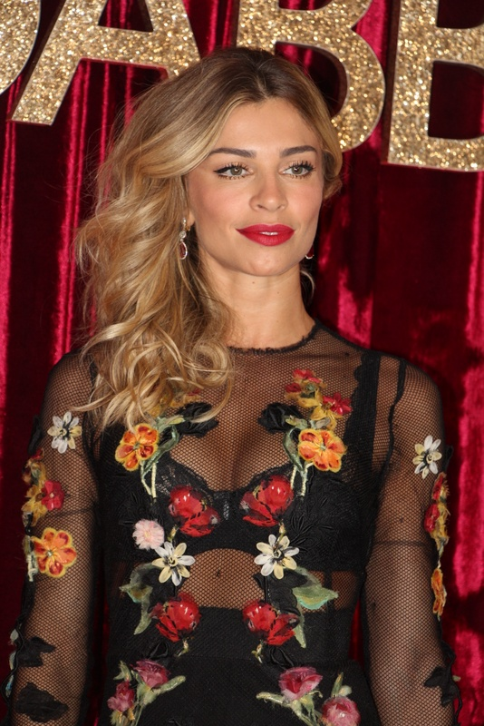 Grazi Massafera-001